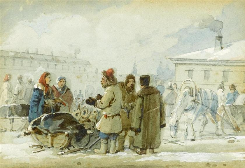 Carl Kollmann, aquarelle : Scène de rue à Saint-Pétersbourg en hiver.